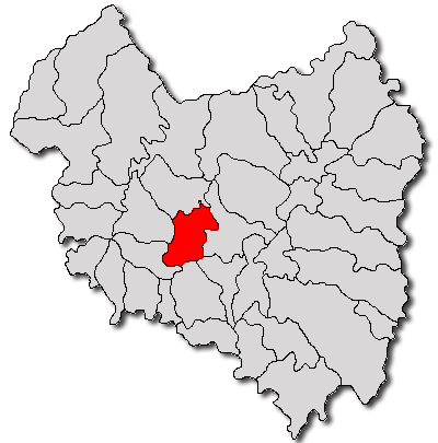 Categorie:Hărţi ale judeţului Covasna